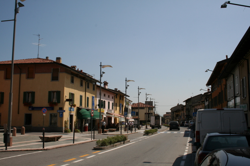 Calcio BG, vista